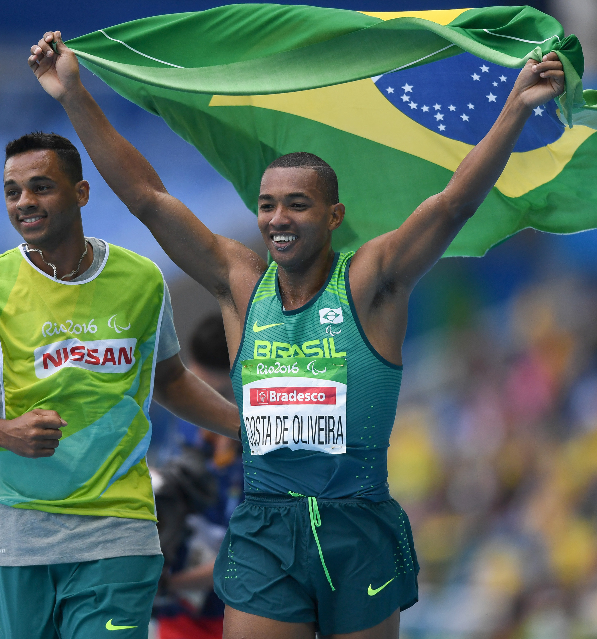 Rio de Janeiro - Ricardo Costa Oliveira conquista a medalha de ouro no salto a distância T11. Primeira medalha de ouro do Brasil nas Paralimpíadas Rio 2016 (Tânia Rêgo/Agência Brasil)